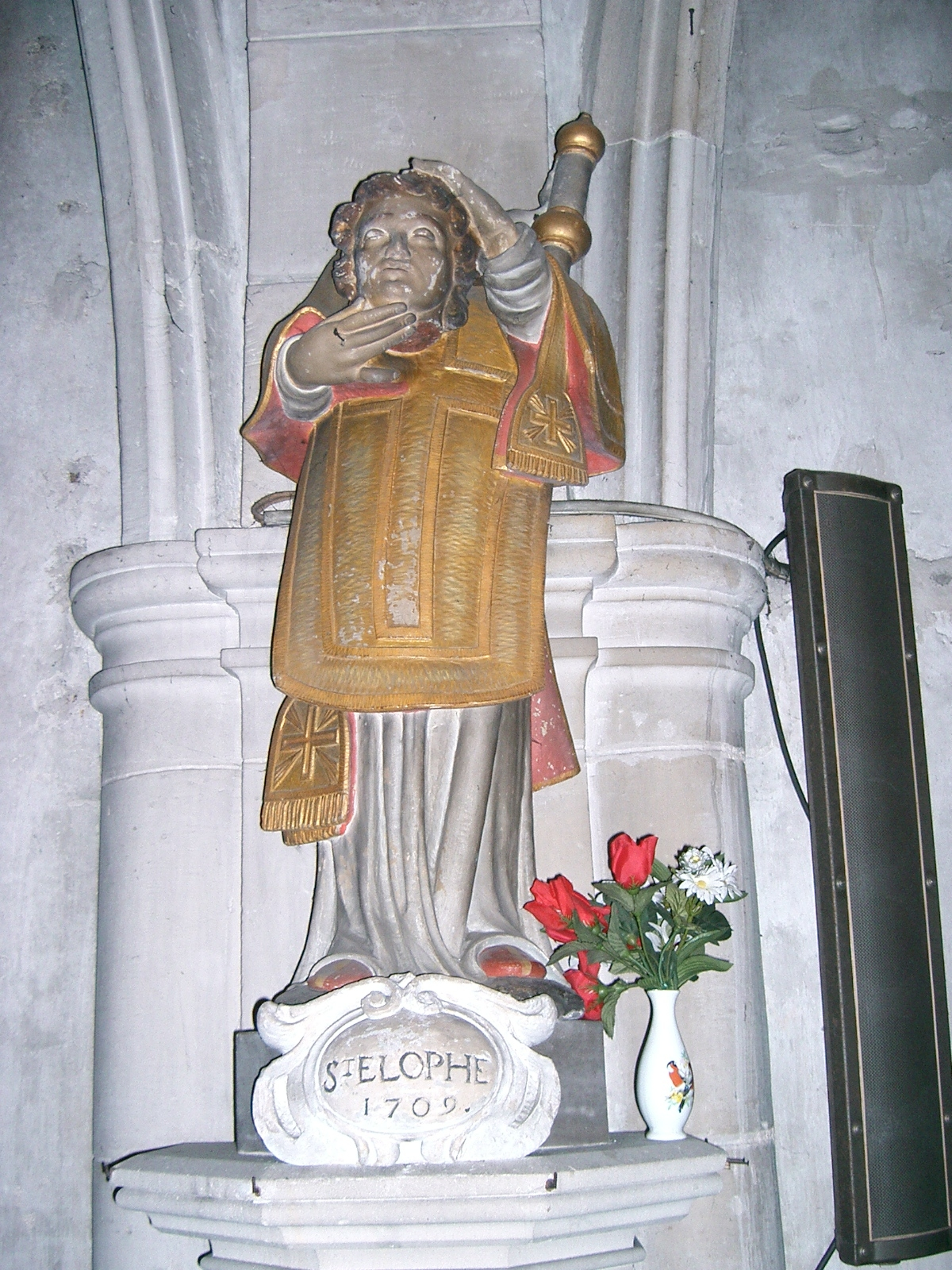 Domrémy - intérieur de l'église : statue de saint Elophe portant sa tête coupée